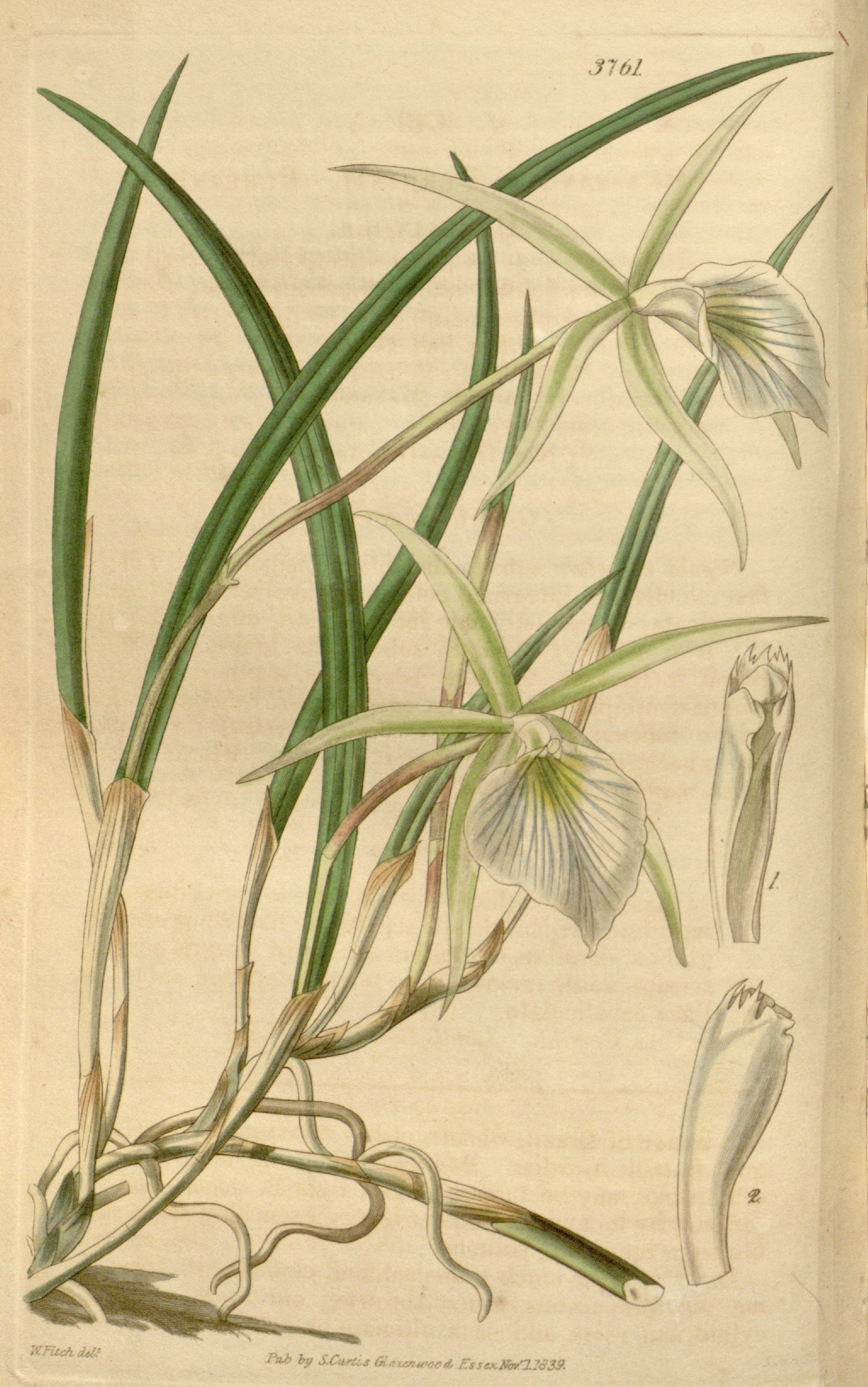 Illustration of Brassavola tuberculata (as syn. Brassavola perrinii)